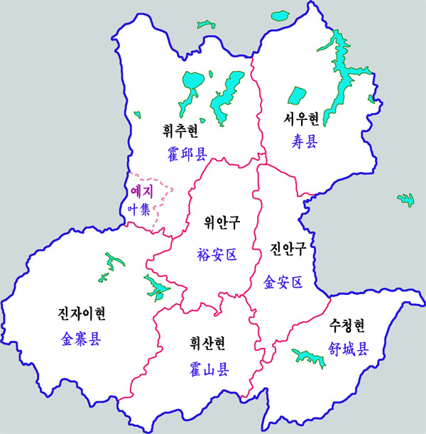 루안시 현급구역도